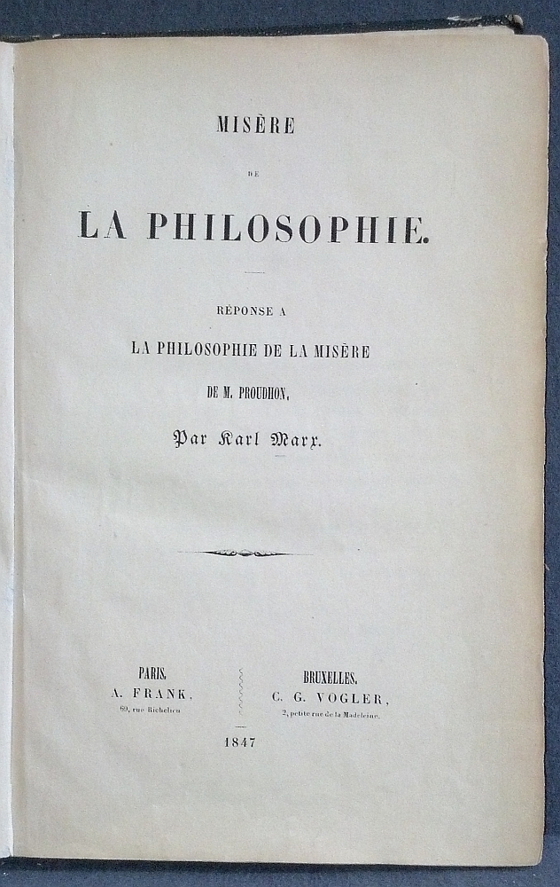 Misère de la philosophie. Réponse a la philosophie de la misère de M. Proudhon (Titelblatt)